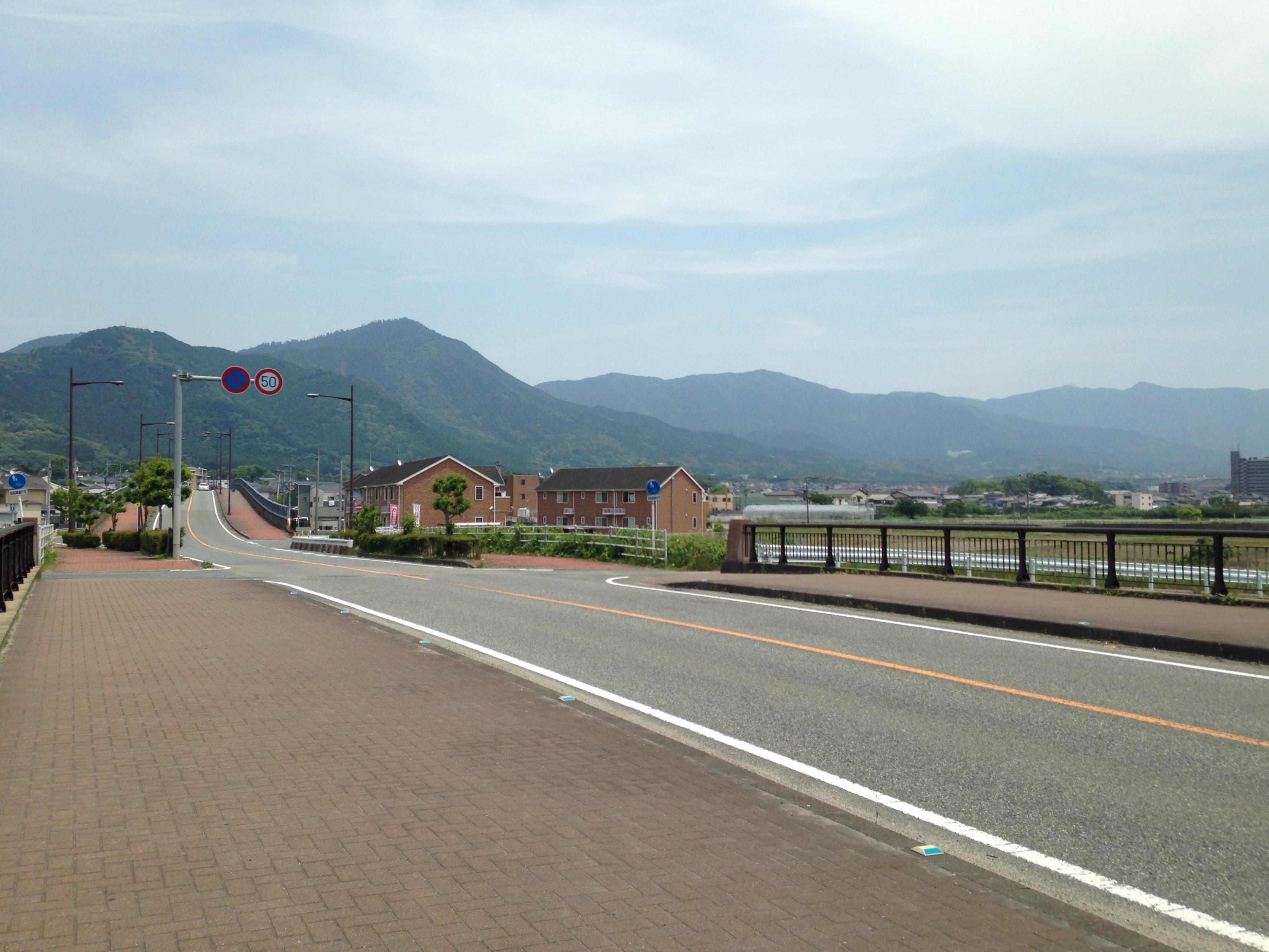 新旅石大橋と福岡県道91号